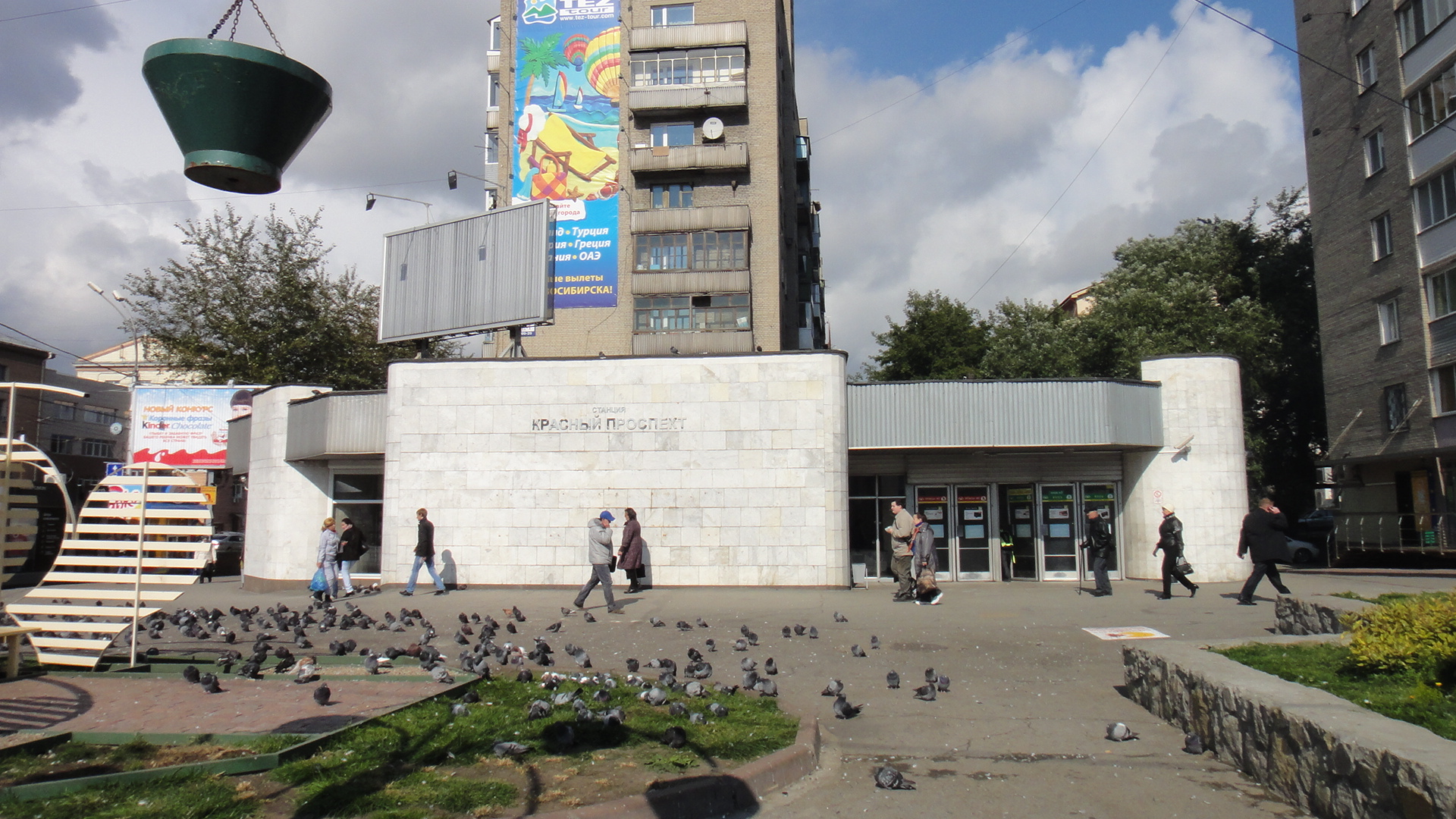 станция метро Красный проспект (Новосибирск)